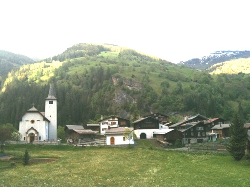 Inden VS, Kanton Wallis